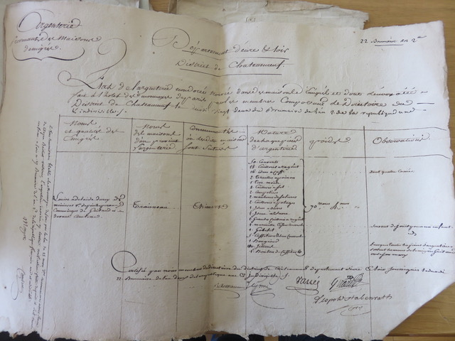 Réquisition par le district de Châteauneuf en Thymerais (Puits la Montagne) de la vaisselle de la comtesse de Guitaut en son château de Tresneau